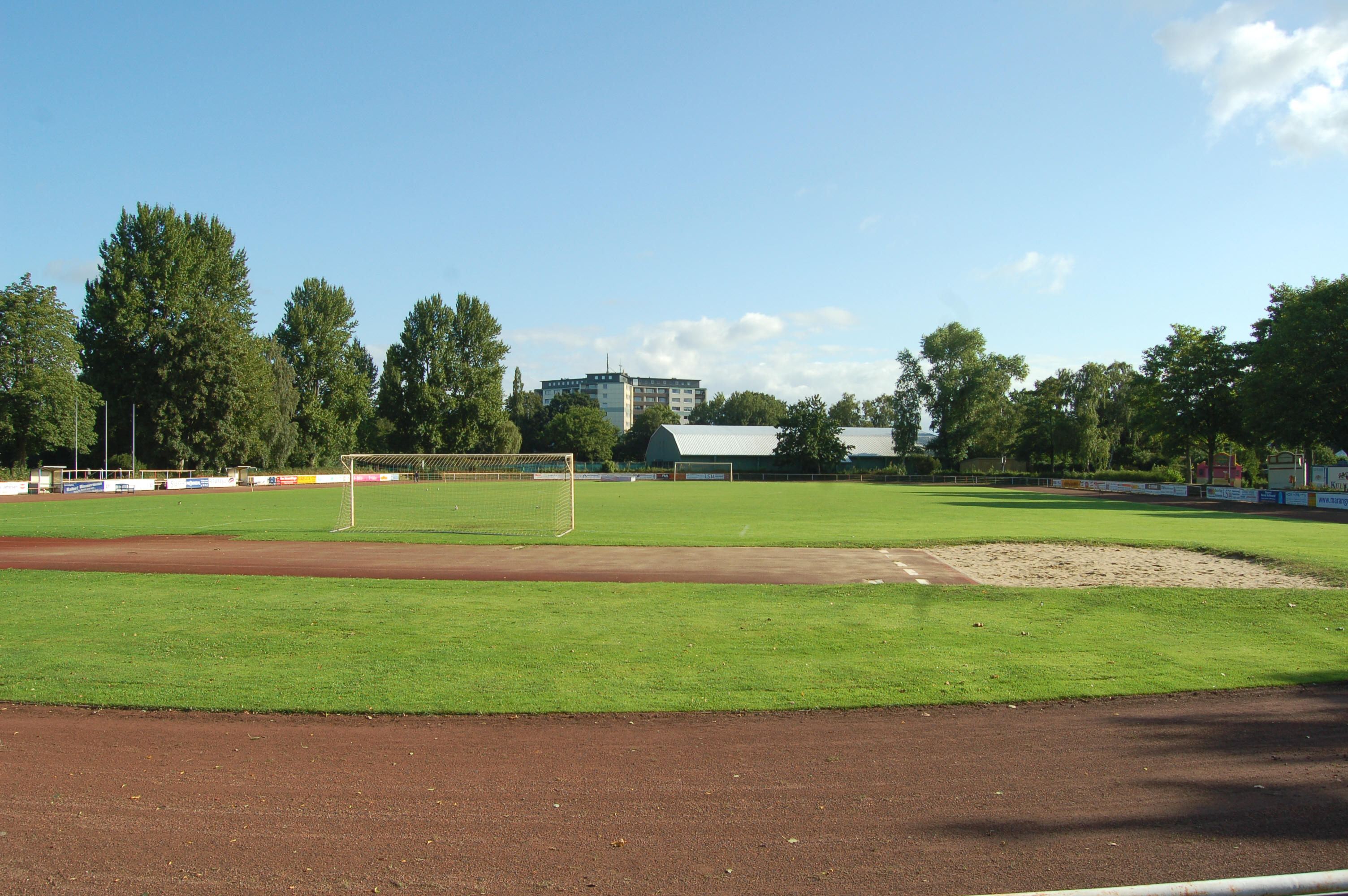 Das Hauptspielfeld des "Rosenstadion" in Uetersen. Das Rosenstadion besitzt insgesamt vier Spielfelder und eine Turnhalle.